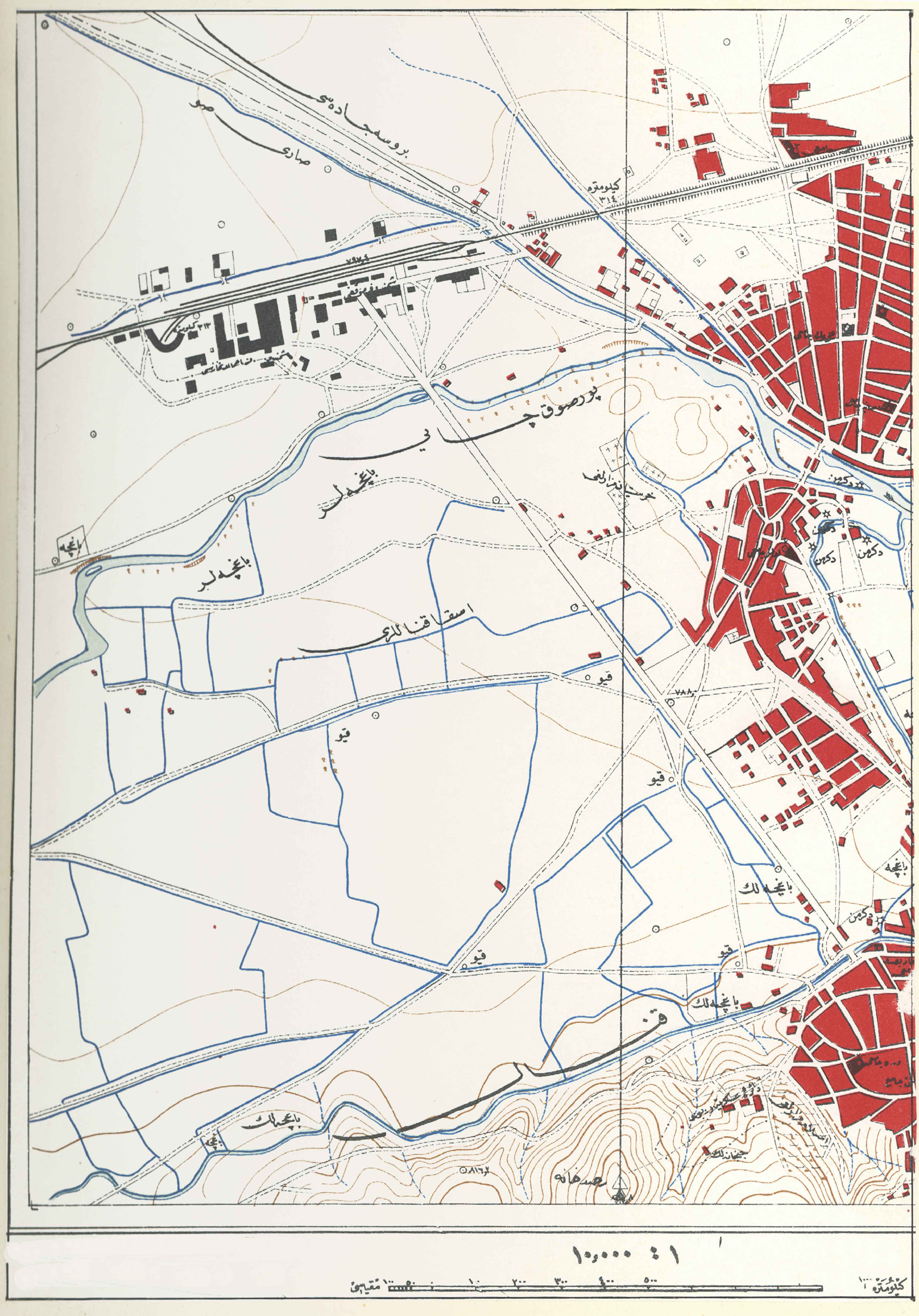 Türk tarihinin ilk modern haritası olan 1/10.000 ölçekli Eskişehir planı.